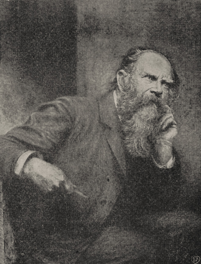 Porträt Eduard von Gebhardt, fast 69-jährig, zum Ehrentag der Übergabe der Wandgemälde in der Friedenskirche in 1907